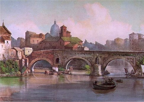 Ponte Rotto ed isola tiberina (rione Ripa)